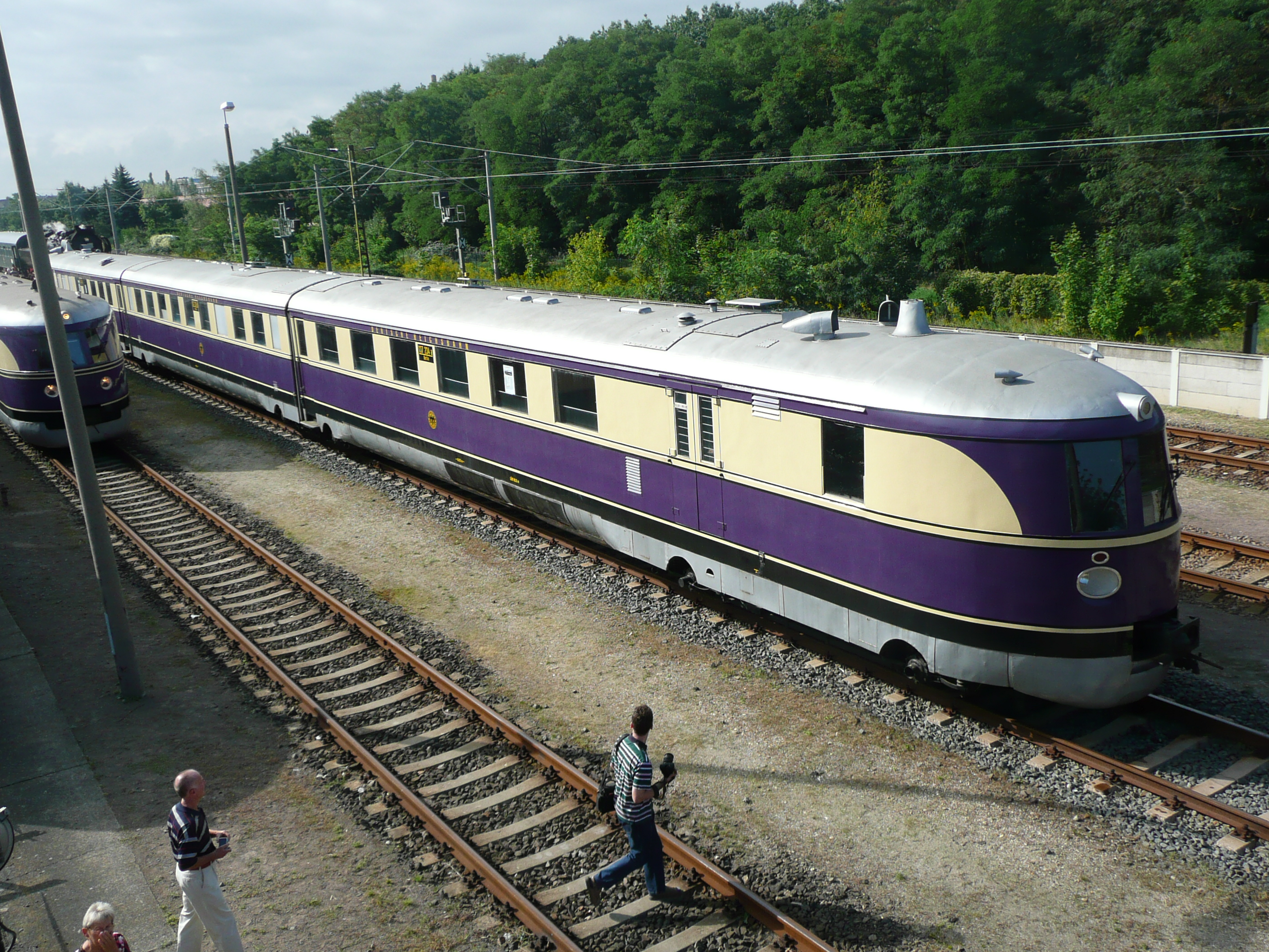 SVT 137 234 im Ausbesserungswerk in Delitzsch